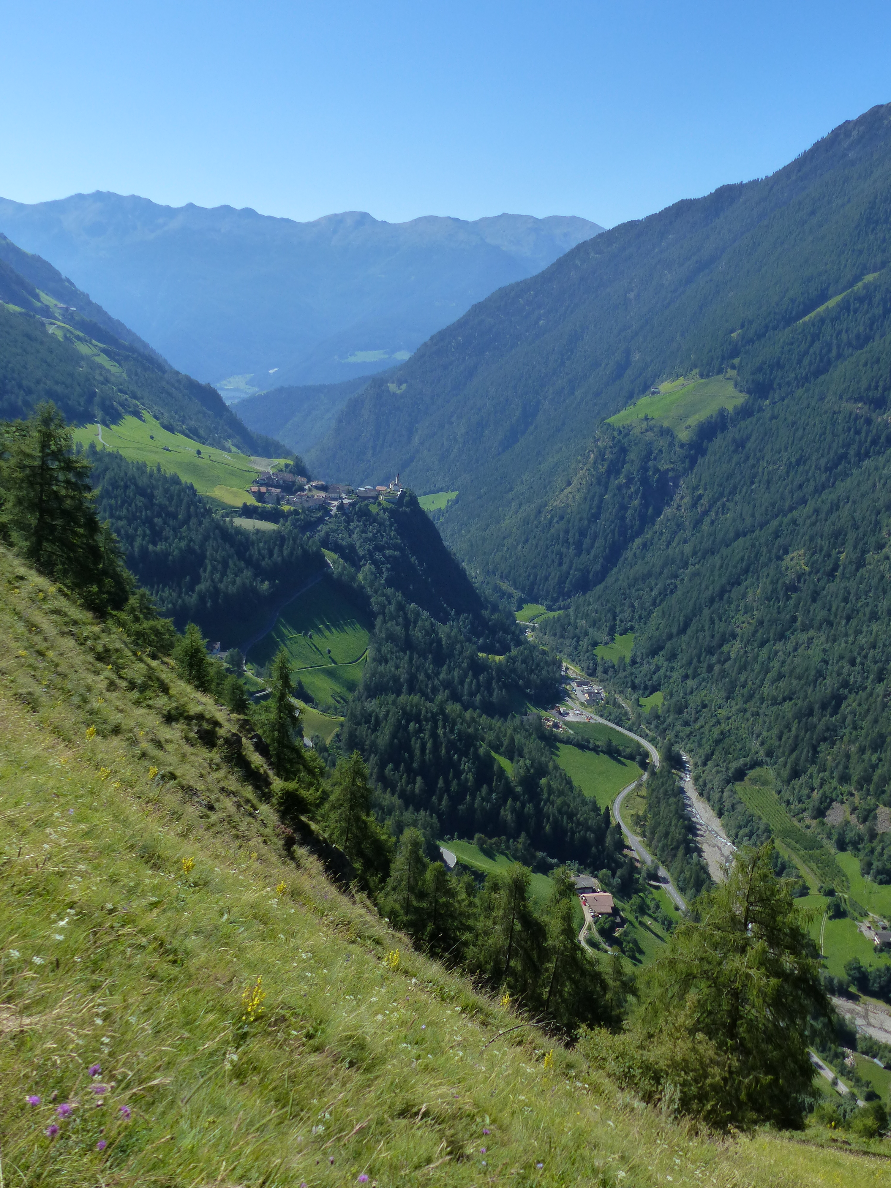 Unteres Schnalstal mit Katharinaberg